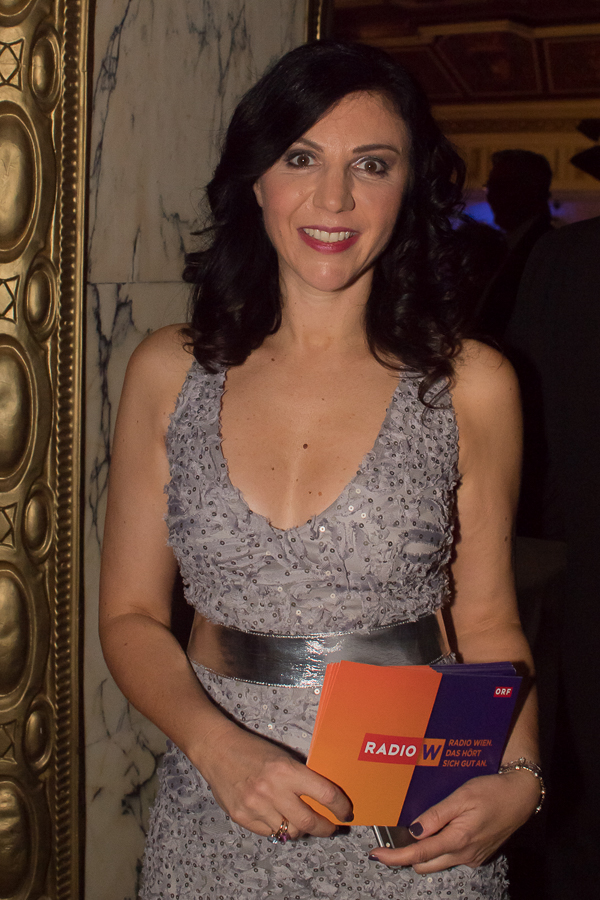 Radio Wien Dancing Stars Ball am 30. April 2017 im Parkhotel Schönbrunn. Bild zeigt Jasmin Dolati.